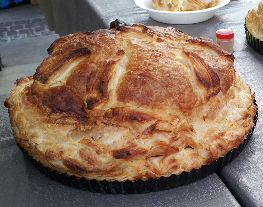 La tourte pérolienne